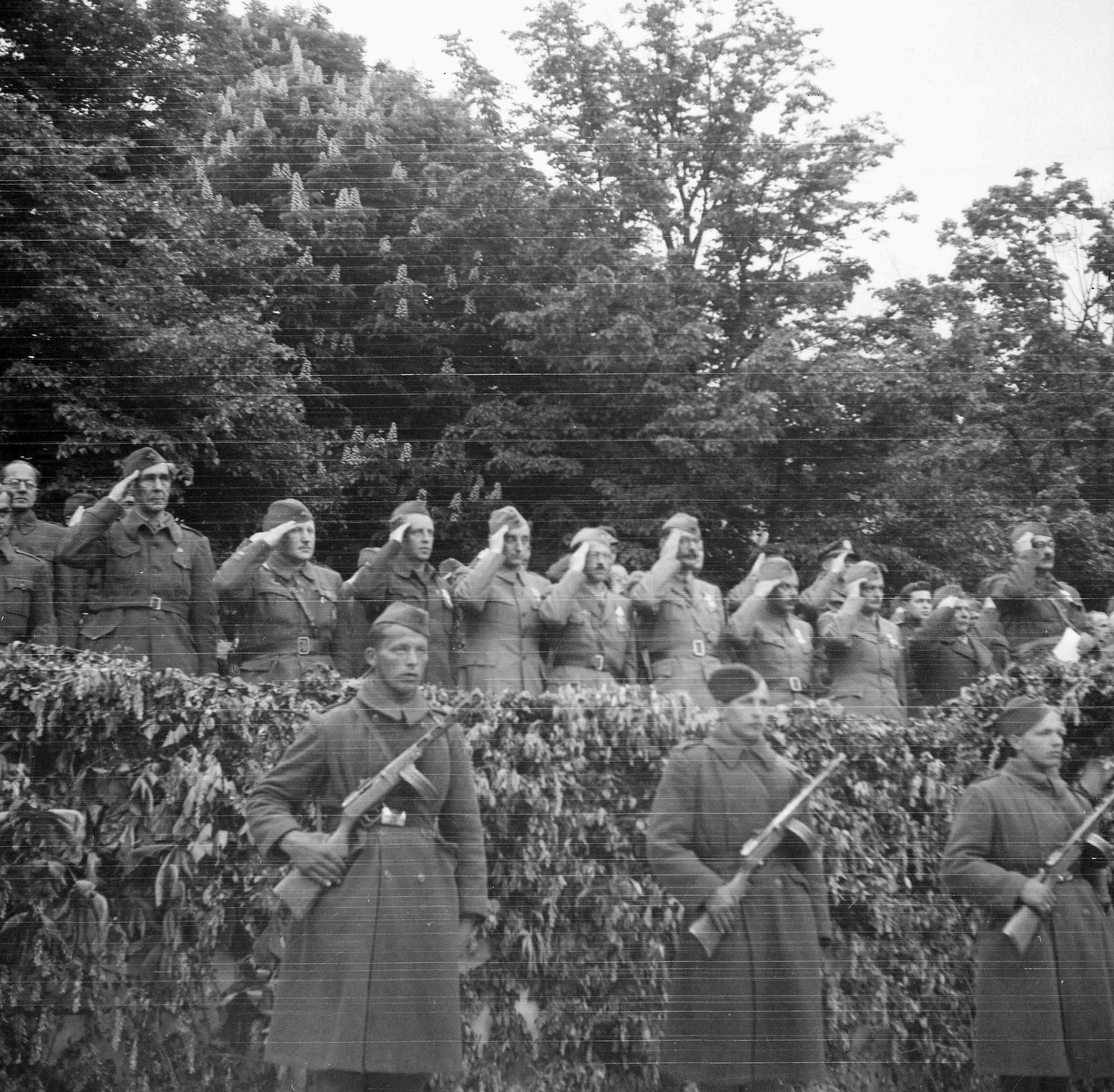 Proglasitev prve slovenske vlade 5.5.1945 v Ajdovščini. Na posnetku častni pozdrav članov prve slovenske vlade na častni tribuni.